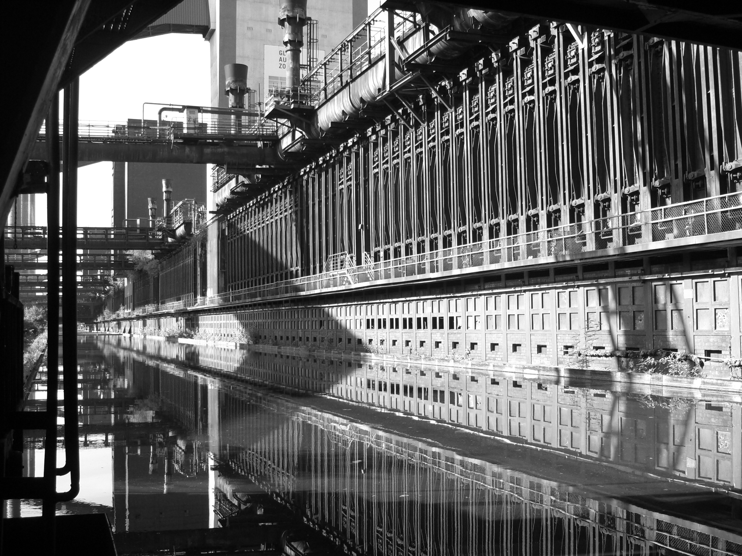 Zollverein Essen Kanal an der Kokerei